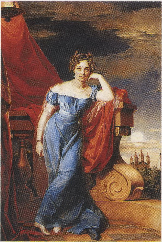 графиня Закревская (Толстая) Аграфена Федоровна Ранее в описании этого файла стояло Гейтман Егор (Heytman, Георг-Иоганн), Третьяковская галерея. Но Гейтман - это гравер.